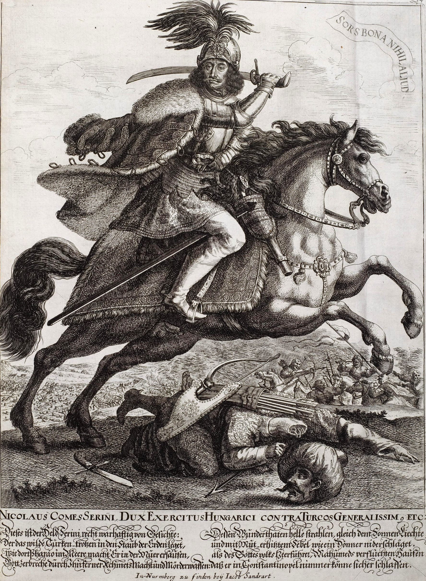 Zrinyi Miklós a költő.